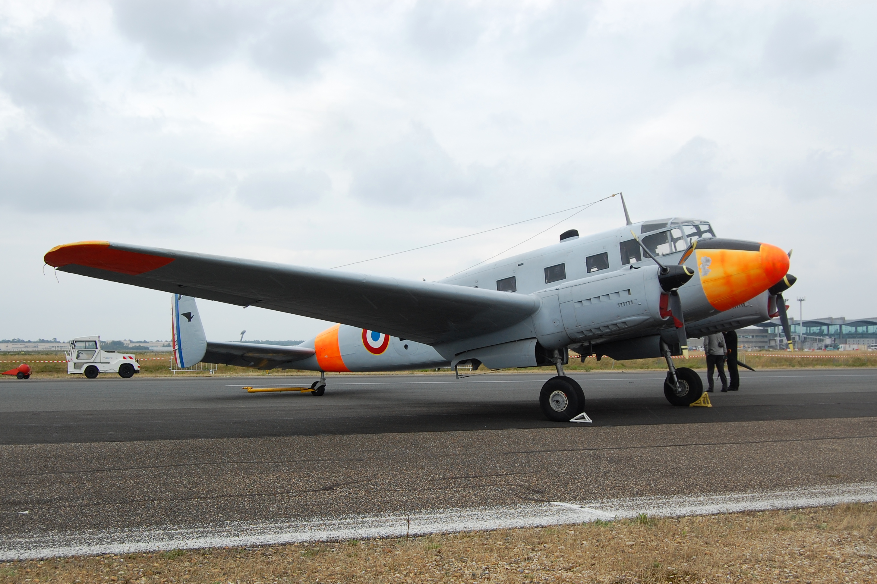 SNCAC NC 702 Martinet aux 100 ans de l’aviation à Mérignac.